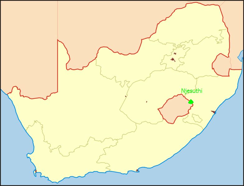 Njesuthi